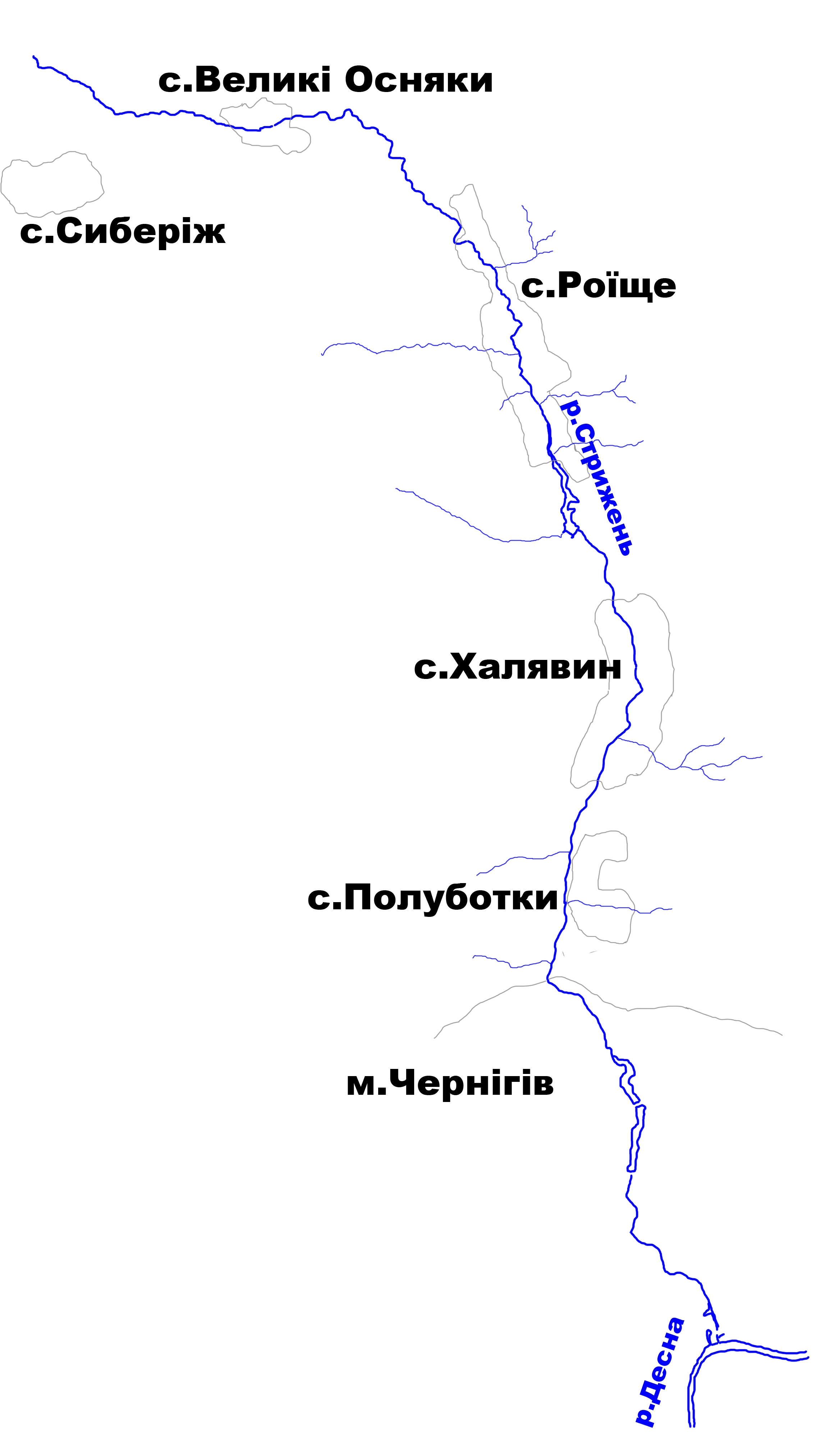 схема русла р.Стрижень Чернігівського района